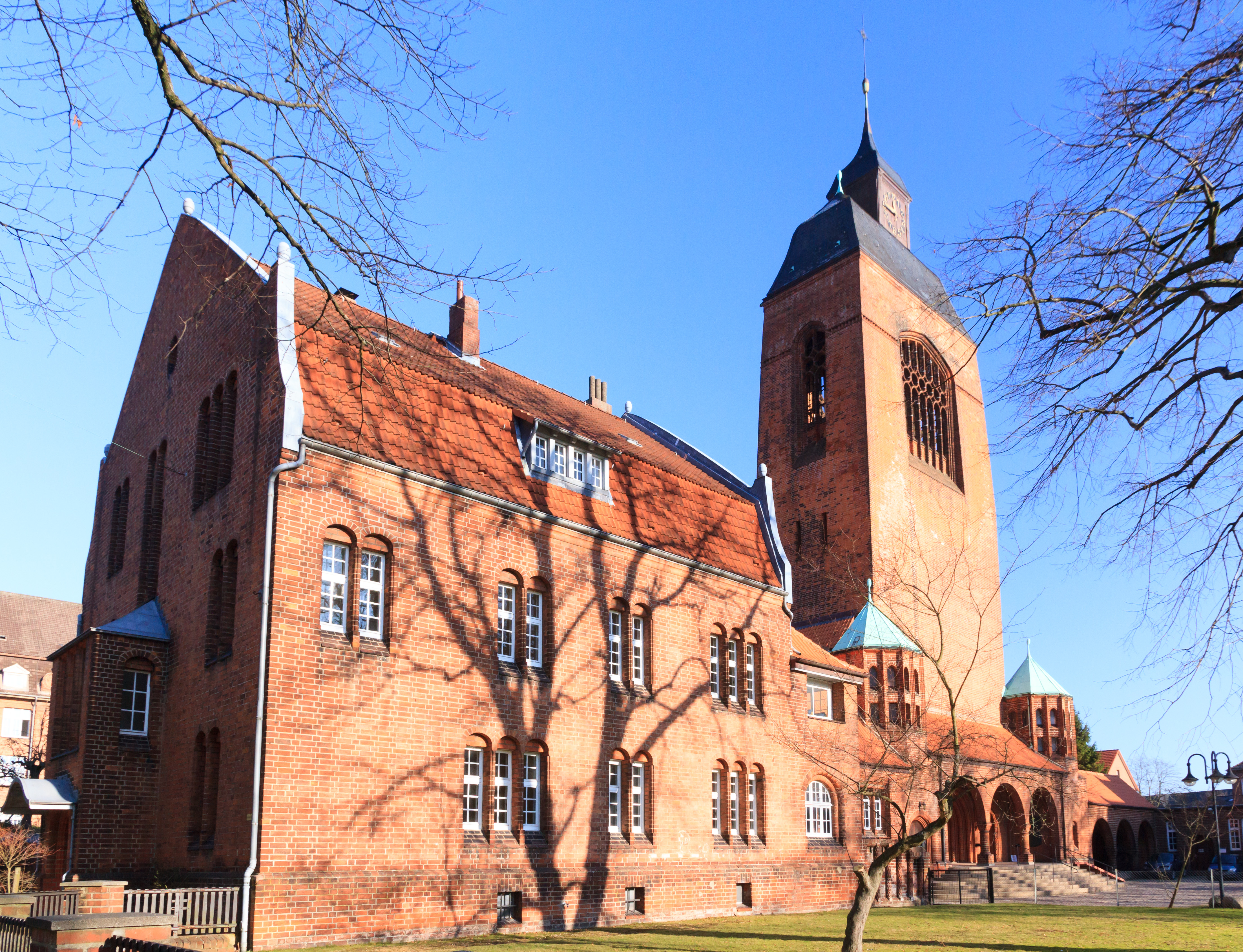 Petruskirche in Kiel-Wik. Erbaut 1905-07 als evangelische Garnisonskirche, Architekten: Curjel und Moser.